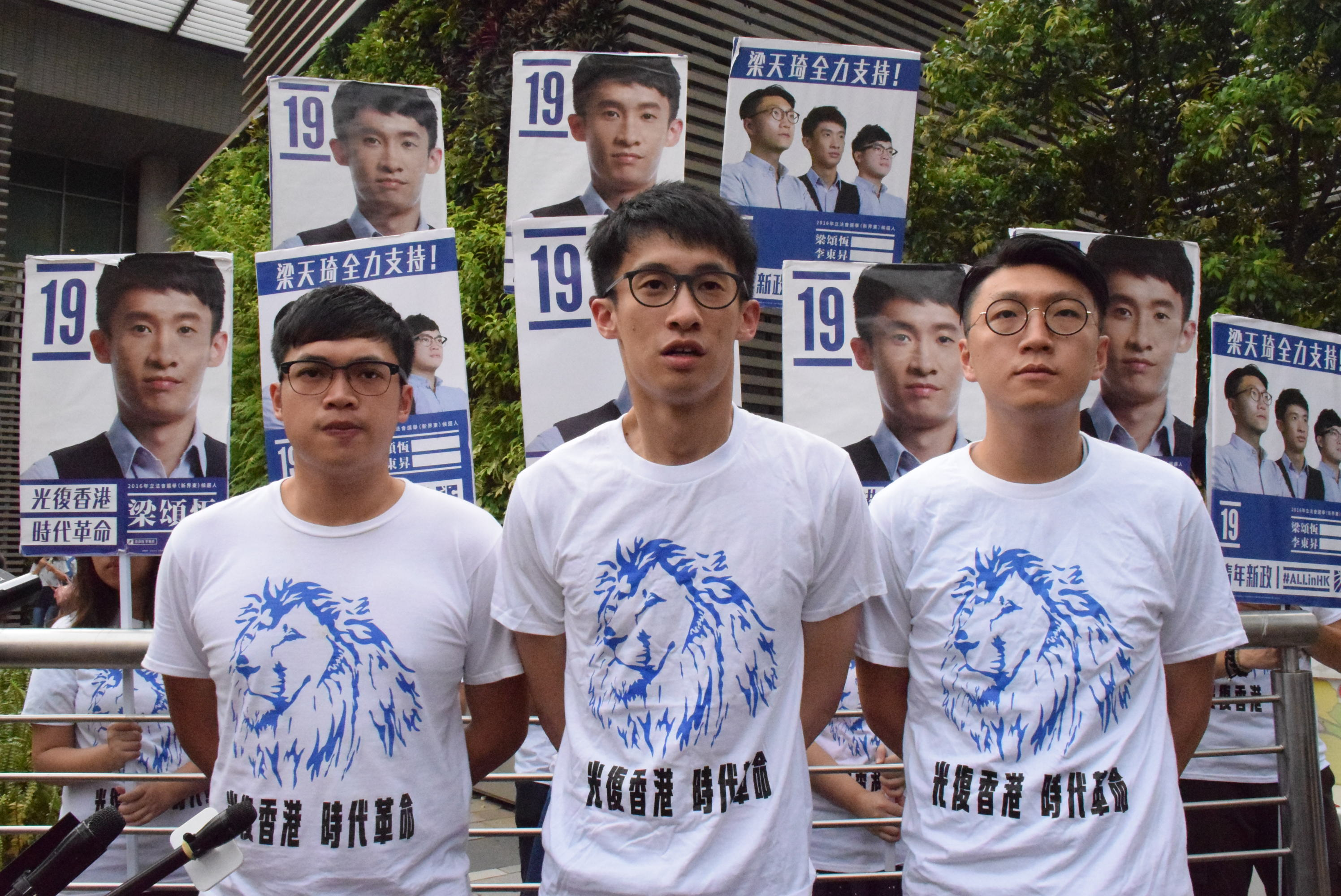 青年新政及本土民主前線立法會選舉後謝票及會見傳媒。(美國之音湯惠芸)